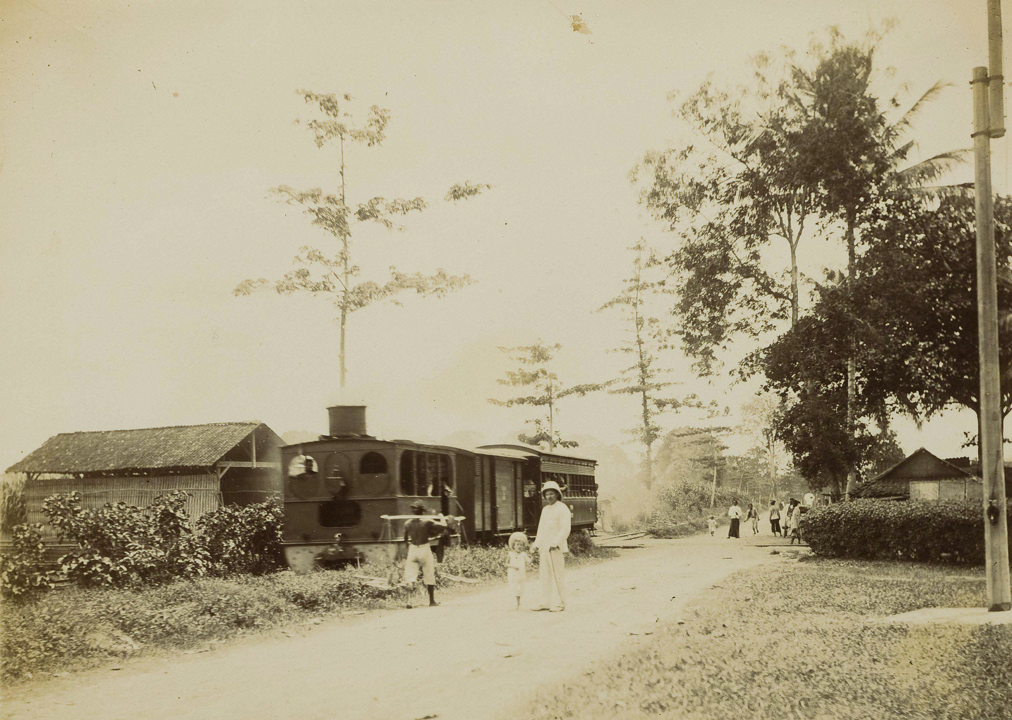 Tram bij de halte Karang Dinajoh op de lijn Pare Kepoeng bij KediriBahasa Indonesia: Trem KSM berhenti di Halte Karangdinoyo